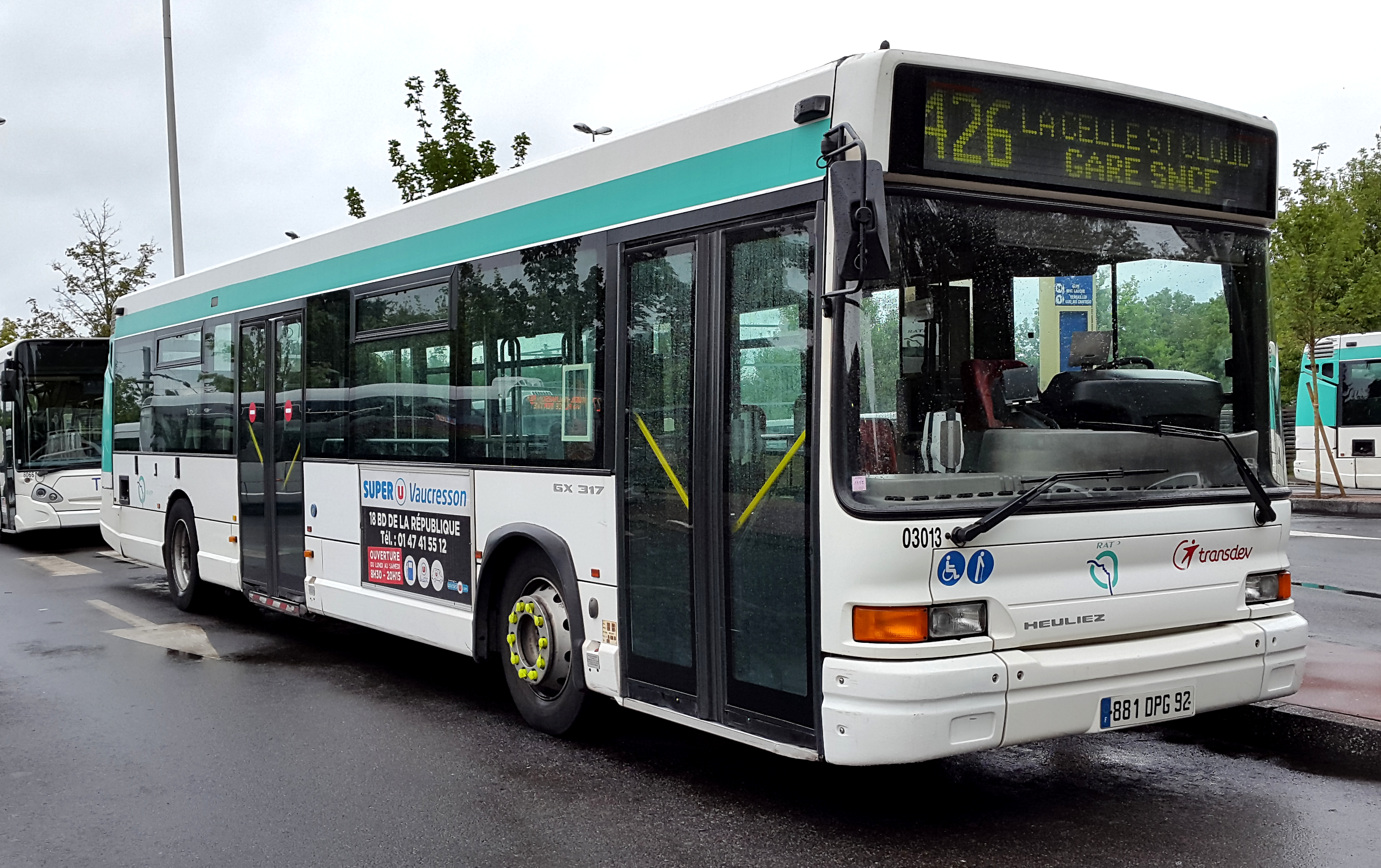 GX317 de Transdev Nanterre des lignes 426, 459, 467 et 471